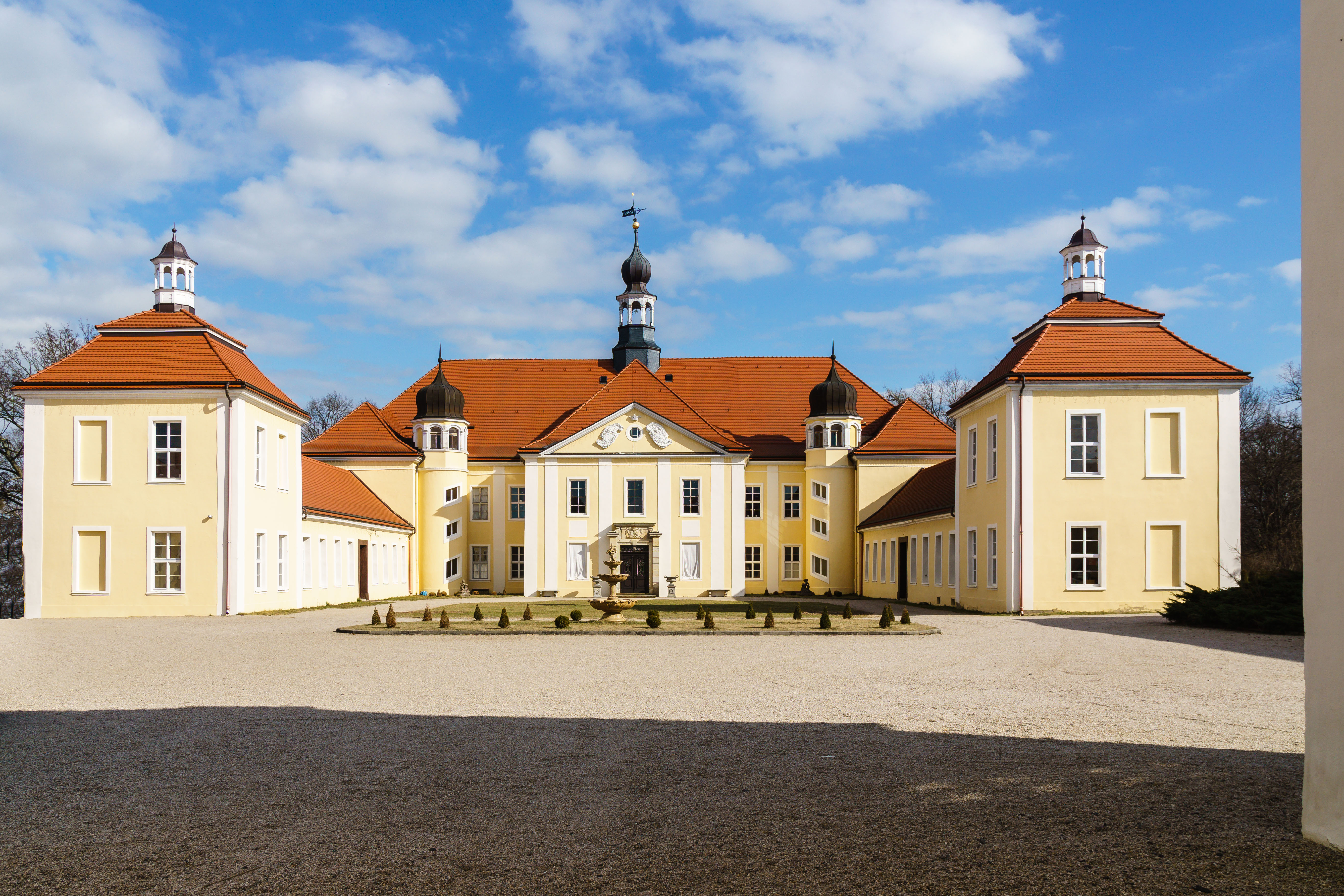 Barockschloss Hohenprießnitz Eilenburger Landstraße 8 Zschepplin OT Hohenprießnitz